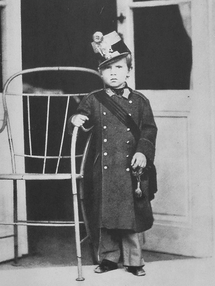 Kronprinz Rudolf an seinem 4. Geburtstag am 21. August 1862. Er empfängt an der Terrassentür der Rudolfsvilla die Gratulanten als Oberst seines Infanterieregiments Nr. 19.